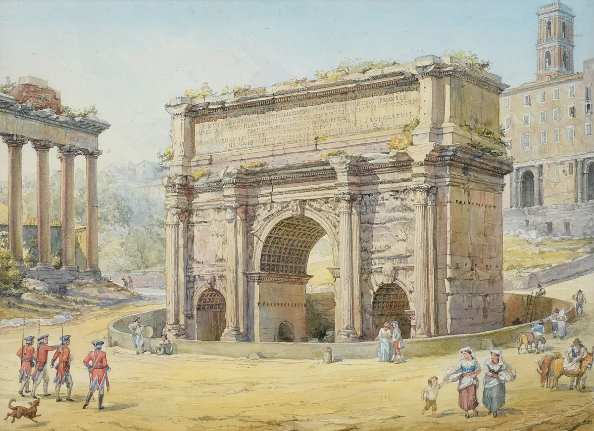 Der Septimius-Severus-Bogen im Forum Romanum. Aquarell. 24,5 x 33 cm